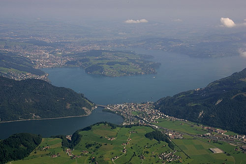 Stans: Blick vom Stanserhorn nach Stansstaad (Vierwaldstättersee)